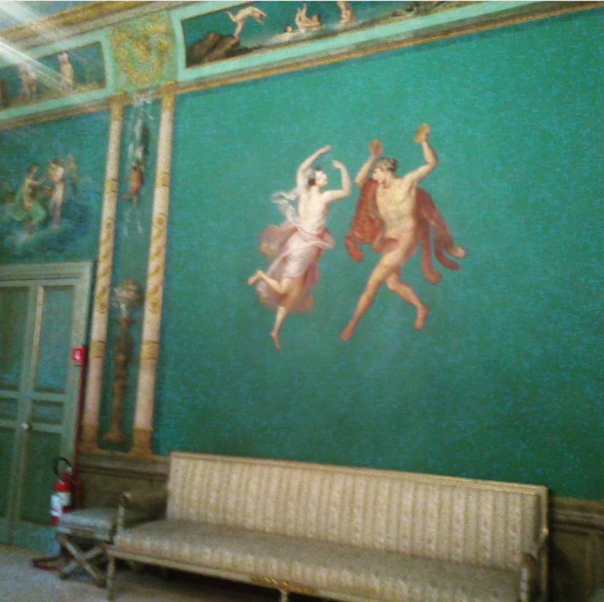 Sala pompeiana, Palazzo dei Normanni, Palermo